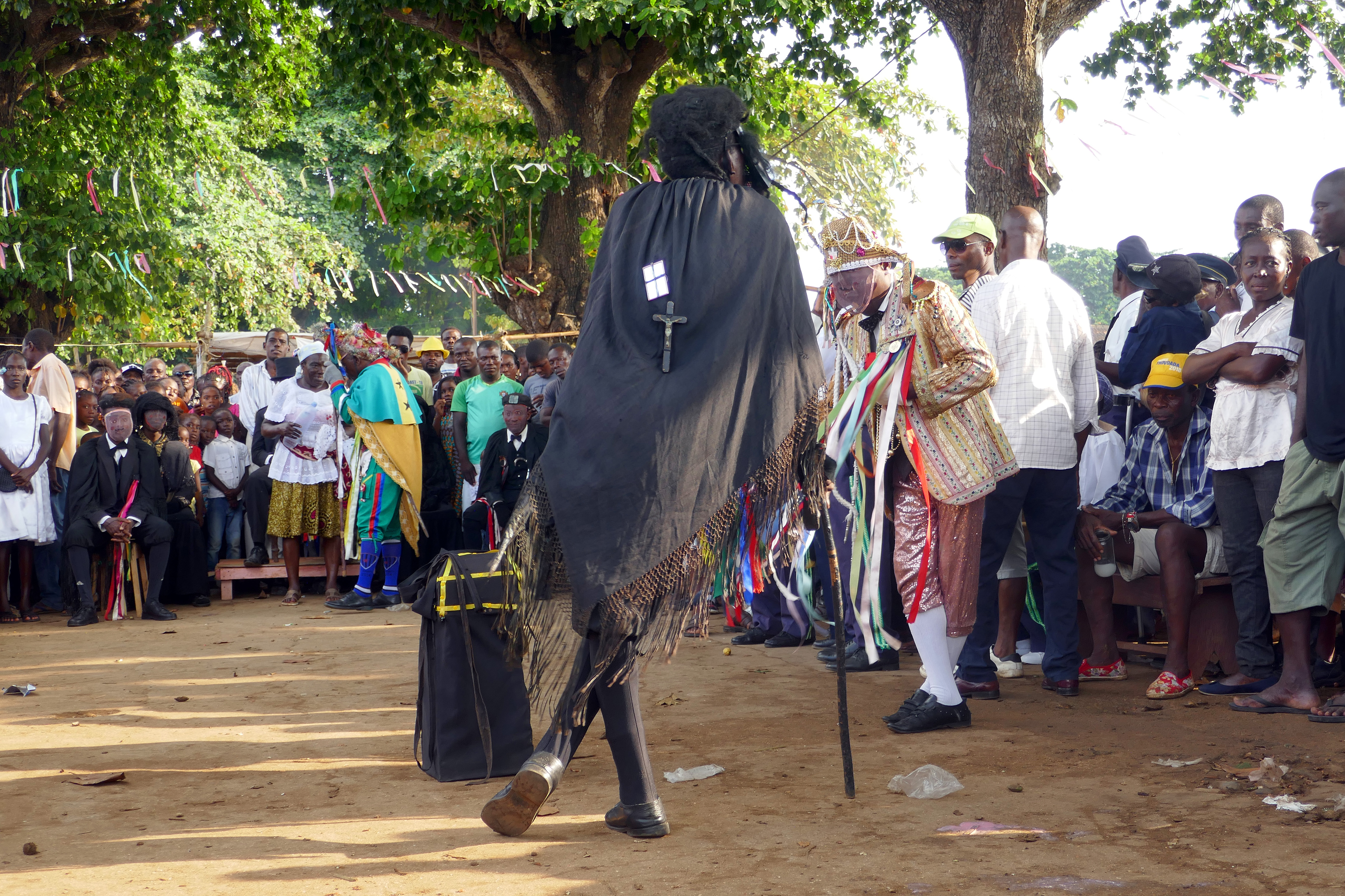 Tchiloli représenté devant l'église São Pedrão de São Tomé à l'occasion de la fête patronale. Le tchiloli est une forme théâtrale, musicale et dansée créée au XVIe siècle, jouée par des pêcheurs et des paysans. Traditionnellement elle met en scène la seule pièce du répertoire, La tragédie du marquis de Mantoue et de l'empereur Charlemagne". This is an image with the theme "Play" from: Sao Tome and Principe